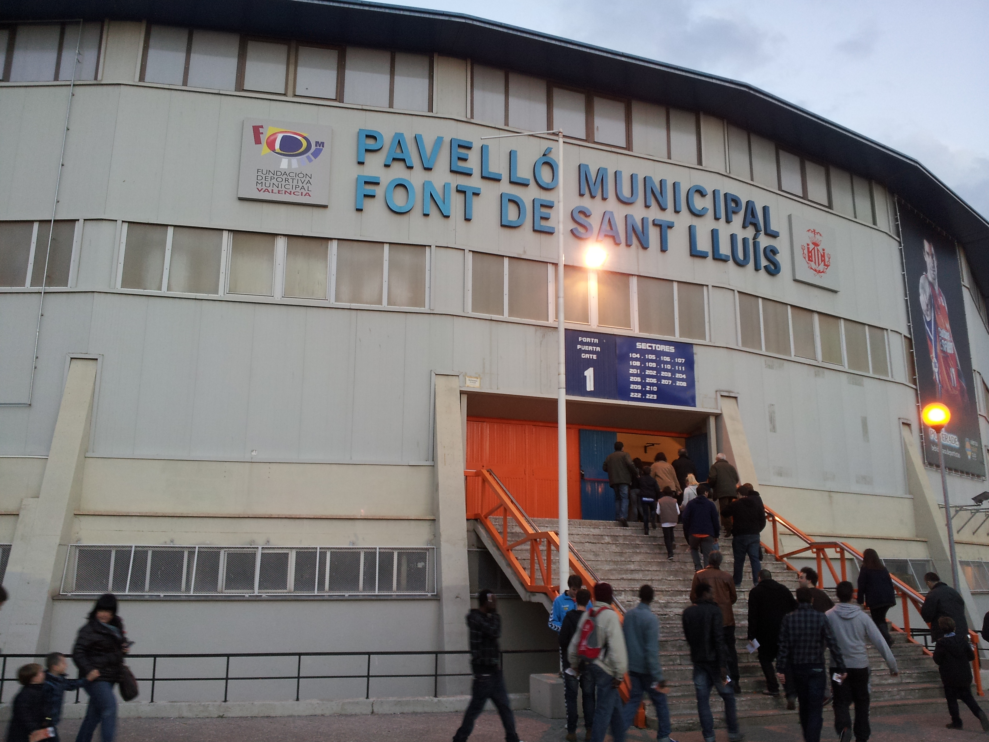 Porta 1 de la Fonteta un dia de partit.